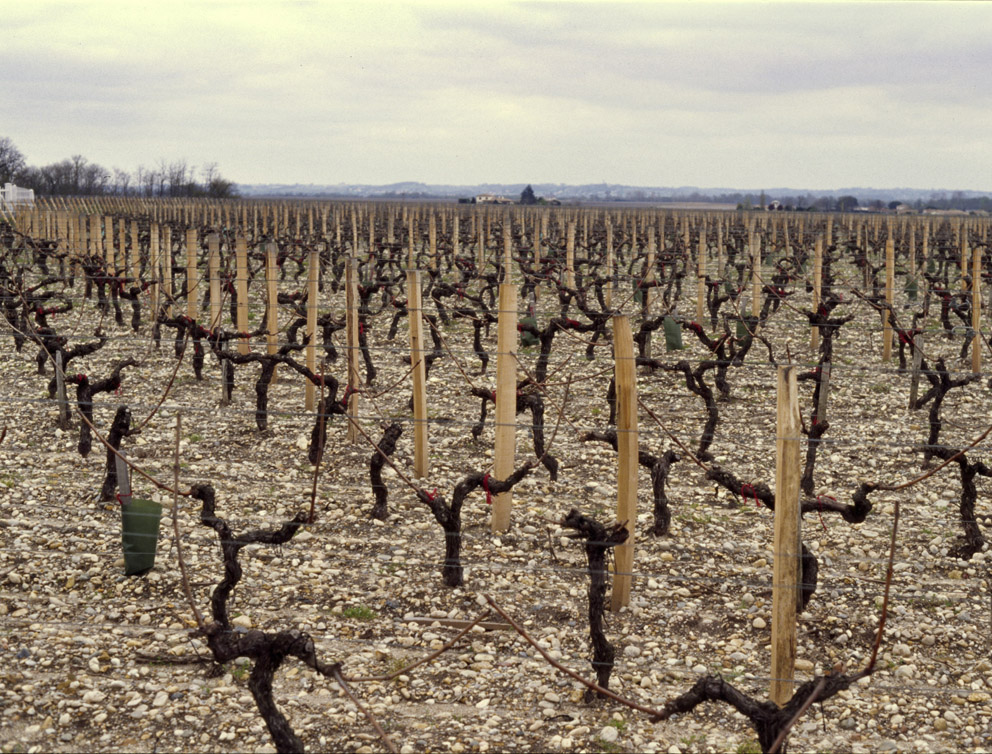 Vignes / Weinberge / Vineyards, Grand-Poujeaux, Moulis-en-Médoc, France